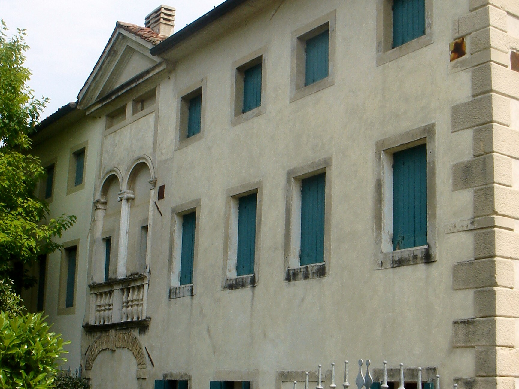 San Fior (Treviso, Italia): villa Pampanini (XVII sec.), elegante struttura secentesca che si incontra lungo la SS 13 Pontebbana, all'altezza della chiesa di San Bernardino.